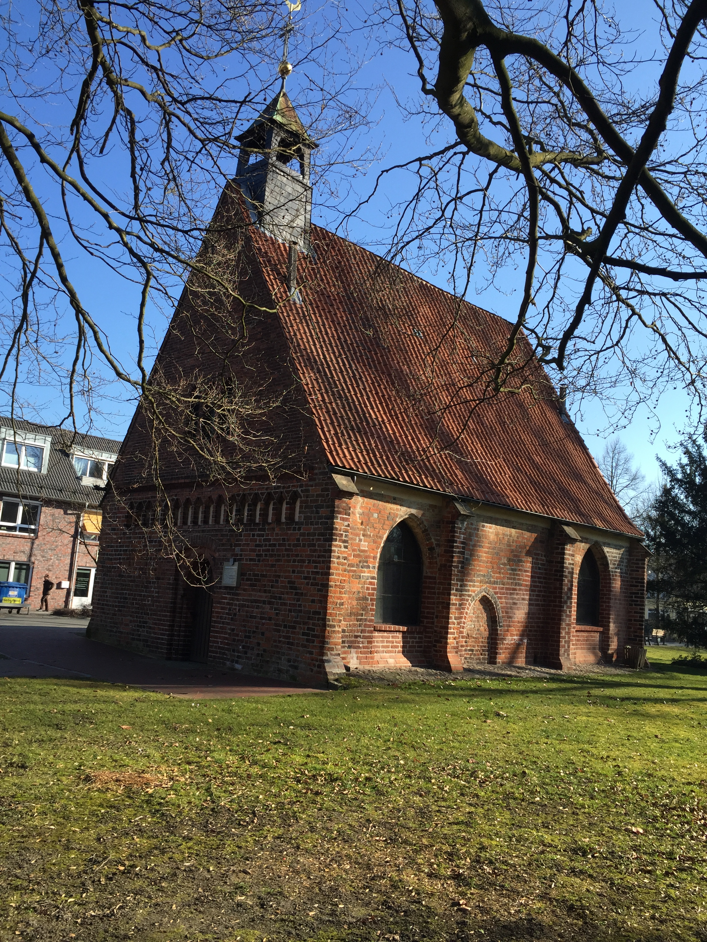 Schräge Seitenansicht der Kapelle